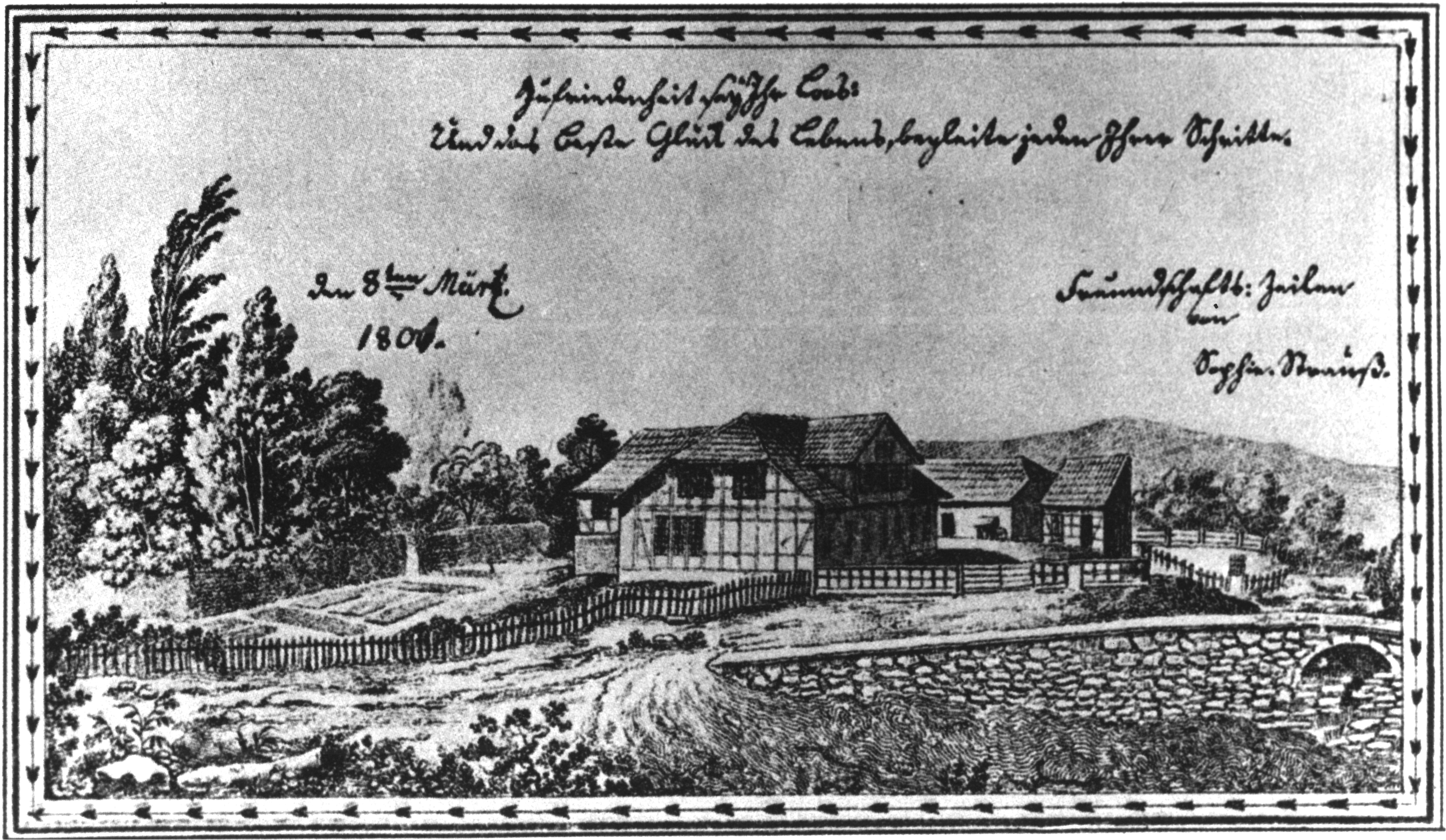 Tierärztliches Institut der Georg-August-Universität Göttingen auf Stammbuchblatt mit Memorabilie in gebrochener Schrift: „Zufriedenheit ſay Ihr Loes(?): Und das Beſte Glück des Lebens, begleite jeden Ihrer Schritte. den 8ten März 18001(?). Freundſchaftl. Zeilen von Sophie. Strauß.“